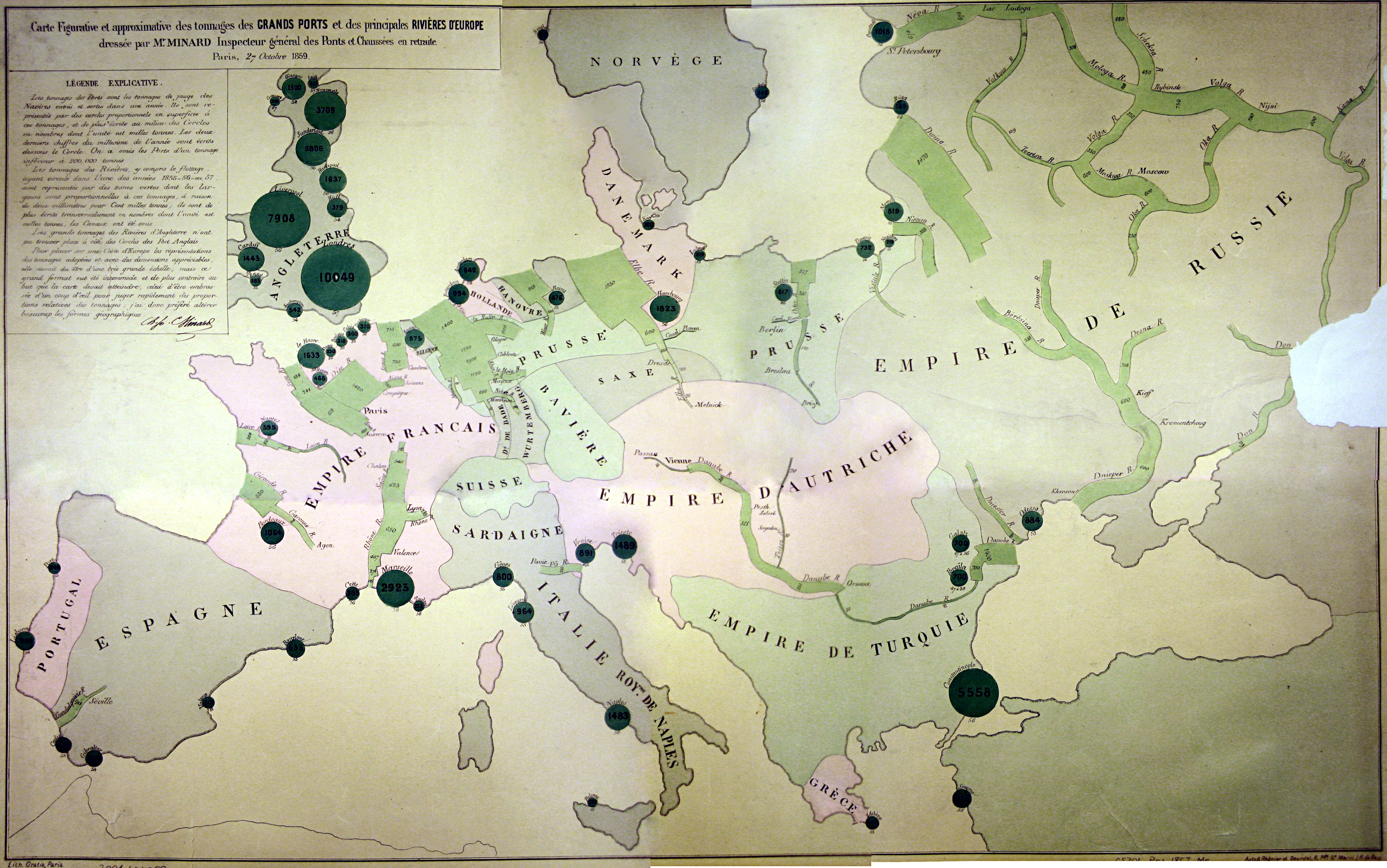 Carte figurative et approximative des tonnages des grands ports et des principales rivières d'Europe